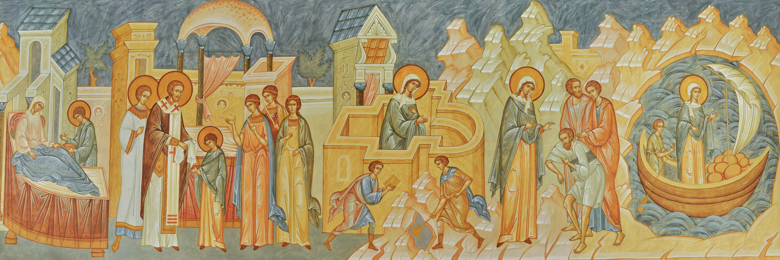 Житие прп. Женевьевы Парижской. Фреска домового храма Русской духовной семинарии во Франции